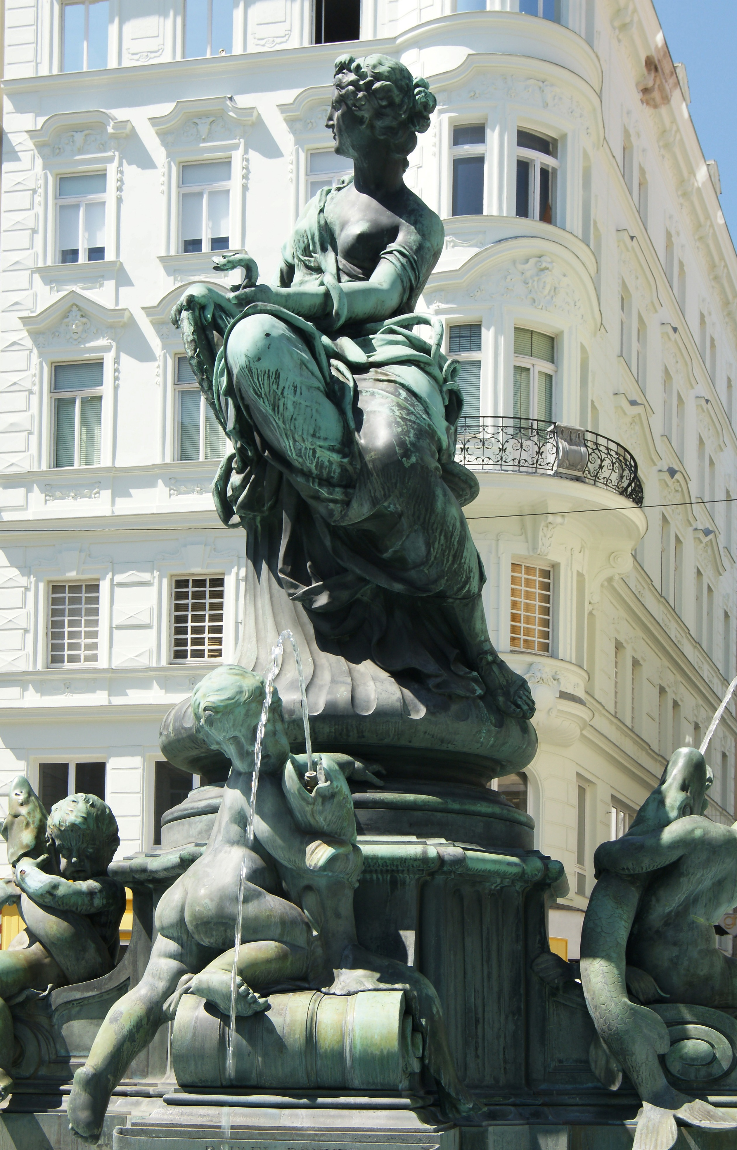 der Donnerbrunnen ist der volkstümliche Name für den von Georg Raphael Donner gestalteten und von 1737 bis 1739 errichteten Providentiabrunnen auf dem Neuen Markt im 1. Wiener Gemeindebezirk Innere Stadt.